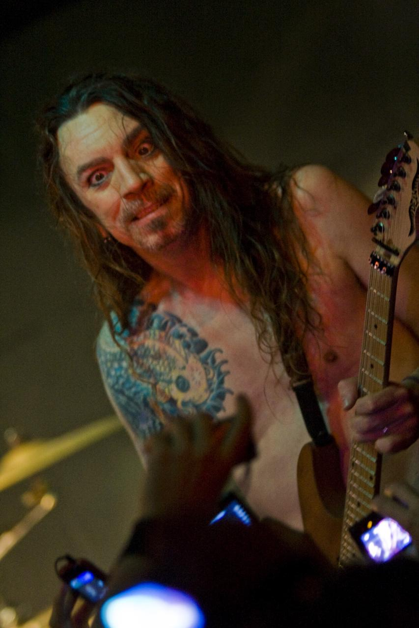 Scotti Hill, guitarrista de Skid Row actuando en São Paulo, Brasil en 2009.